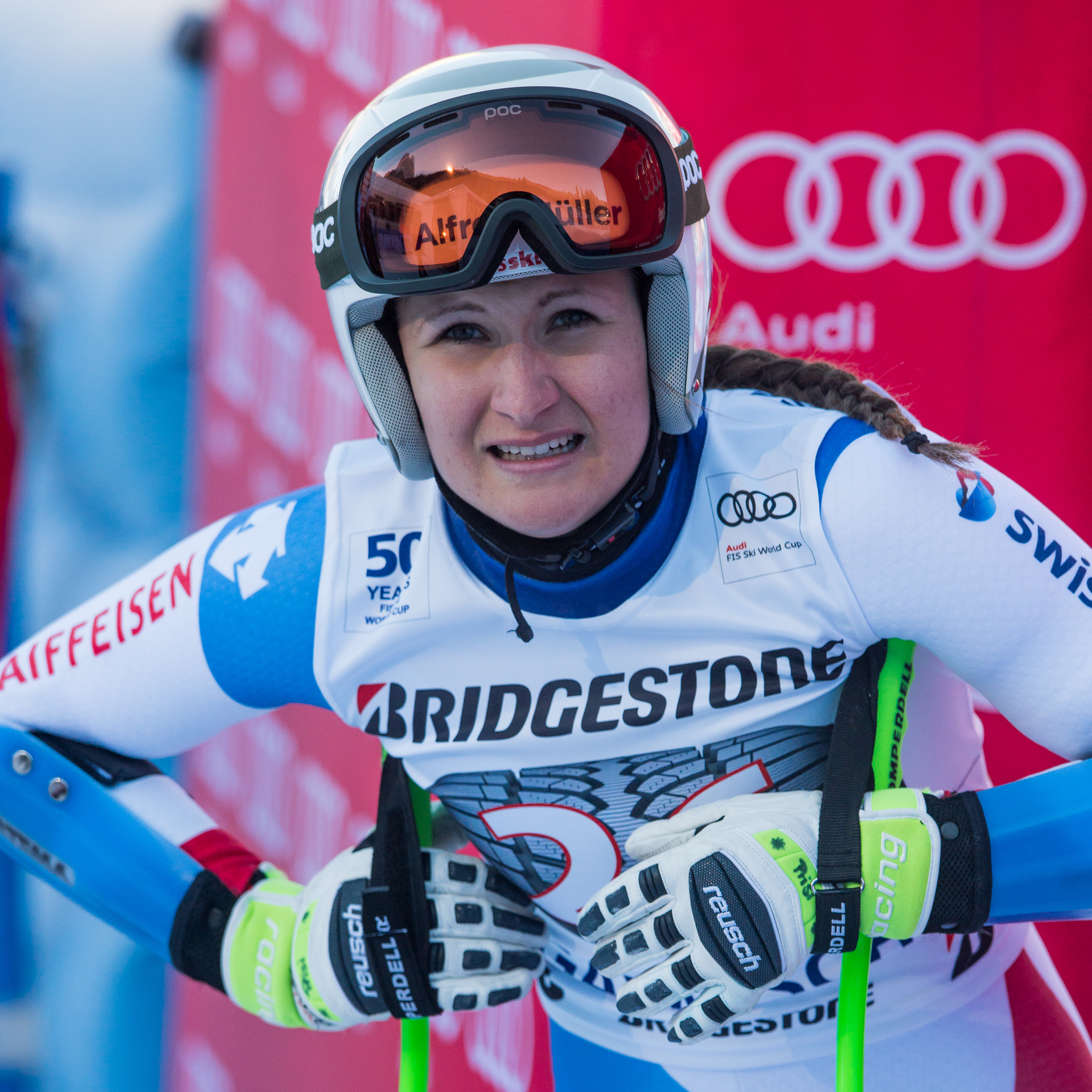 64. Kandahar Rennen,Audi FIS Ski Weltcup Garmisch-Partenkirchen,Damen Super-G,Kandahar,Ladies Super-G,Priska Nufer